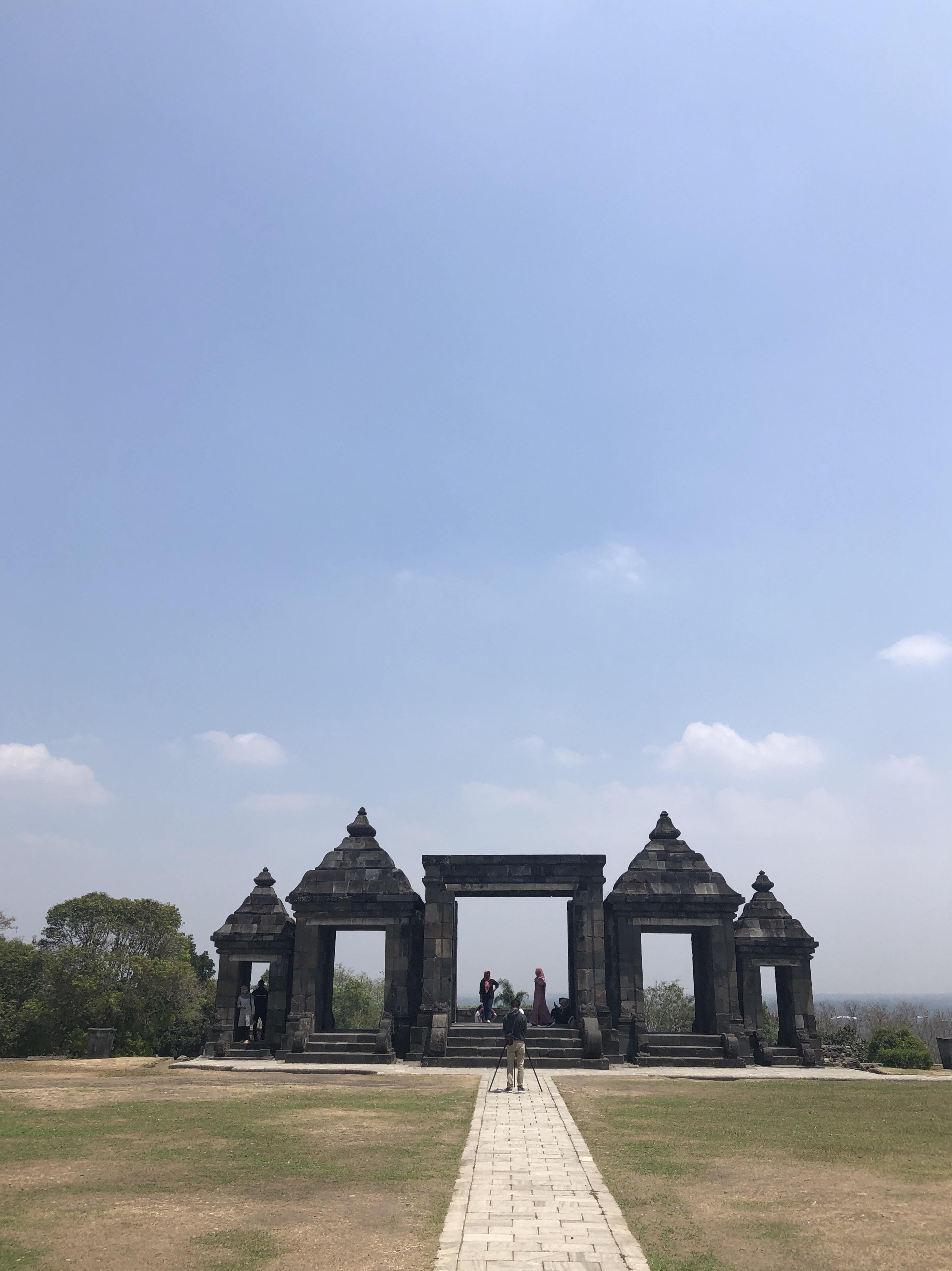 Candhi Ratu Boko adalah situs purbakala yang merupakan kompleks sejumlah sisa bangunan yang berada kira-kira 3 km di sebelah selatan dari kompleks Candi Prambanan, 18 km sebelah timur Kota Yogyakarta atau 50 km barat daya Kota Surakarta, Jawa Tengah, Indonesia. Situs Ratu Boko terletak di sebuah bukit pada ketinggian 196 meter dari permukaan laut. Luas keseluruhan kompleks adalah sekitar 25